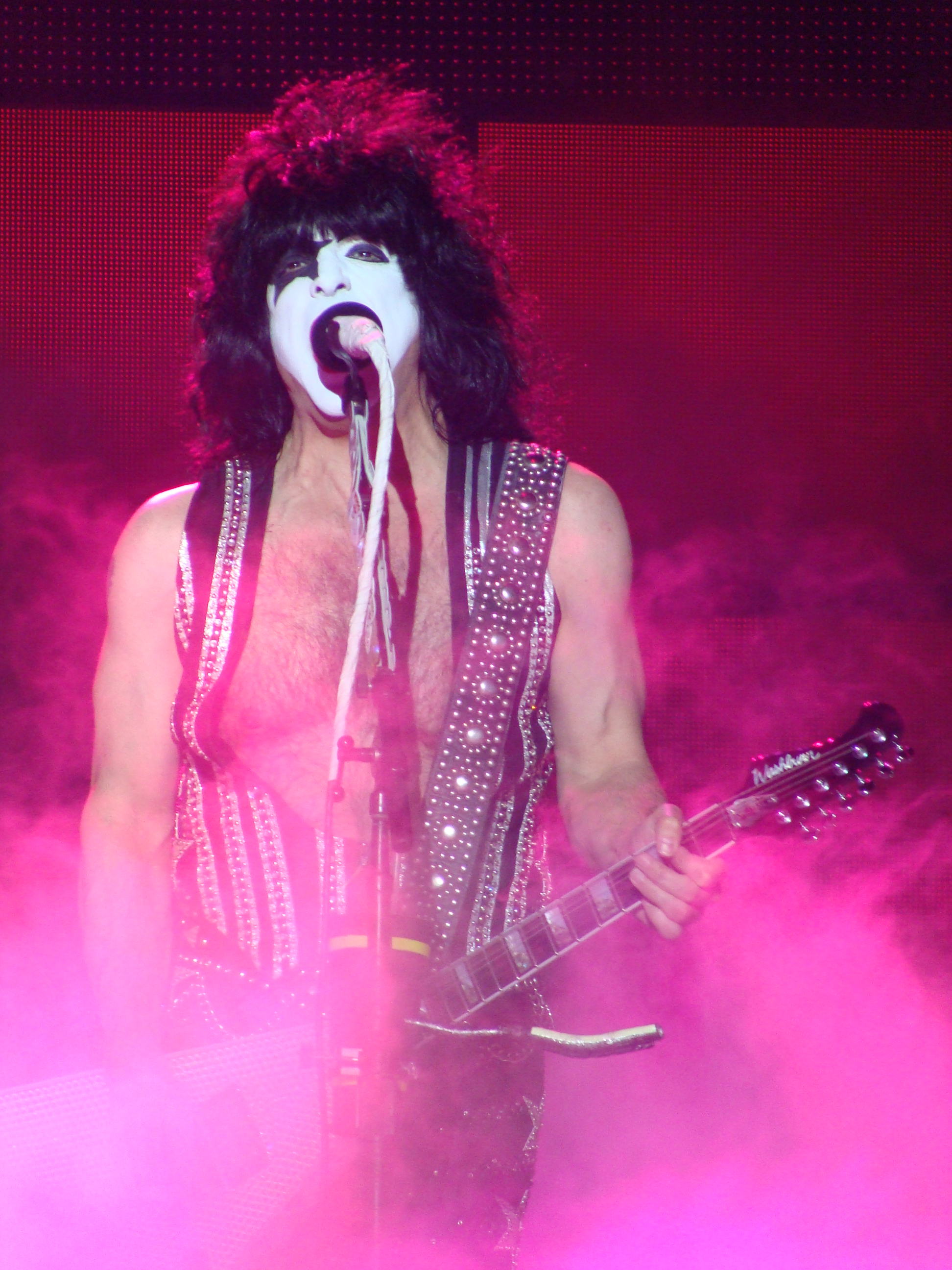 Paul Stanley, en una actuación del grupo KISS en Vitoria-Gasteiz, en el Azkena Rock Festival.